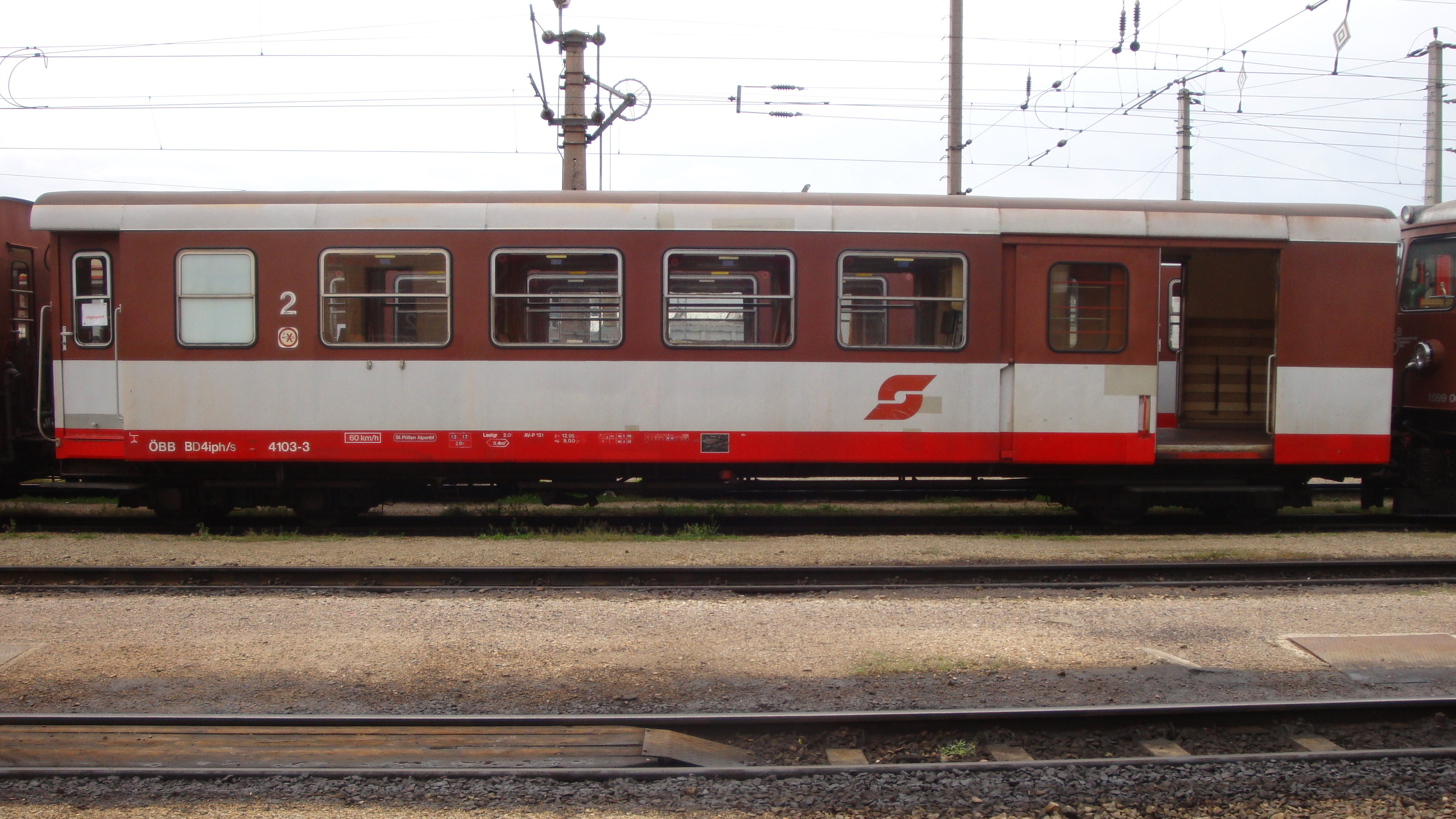 BD4iph/s 4103-3